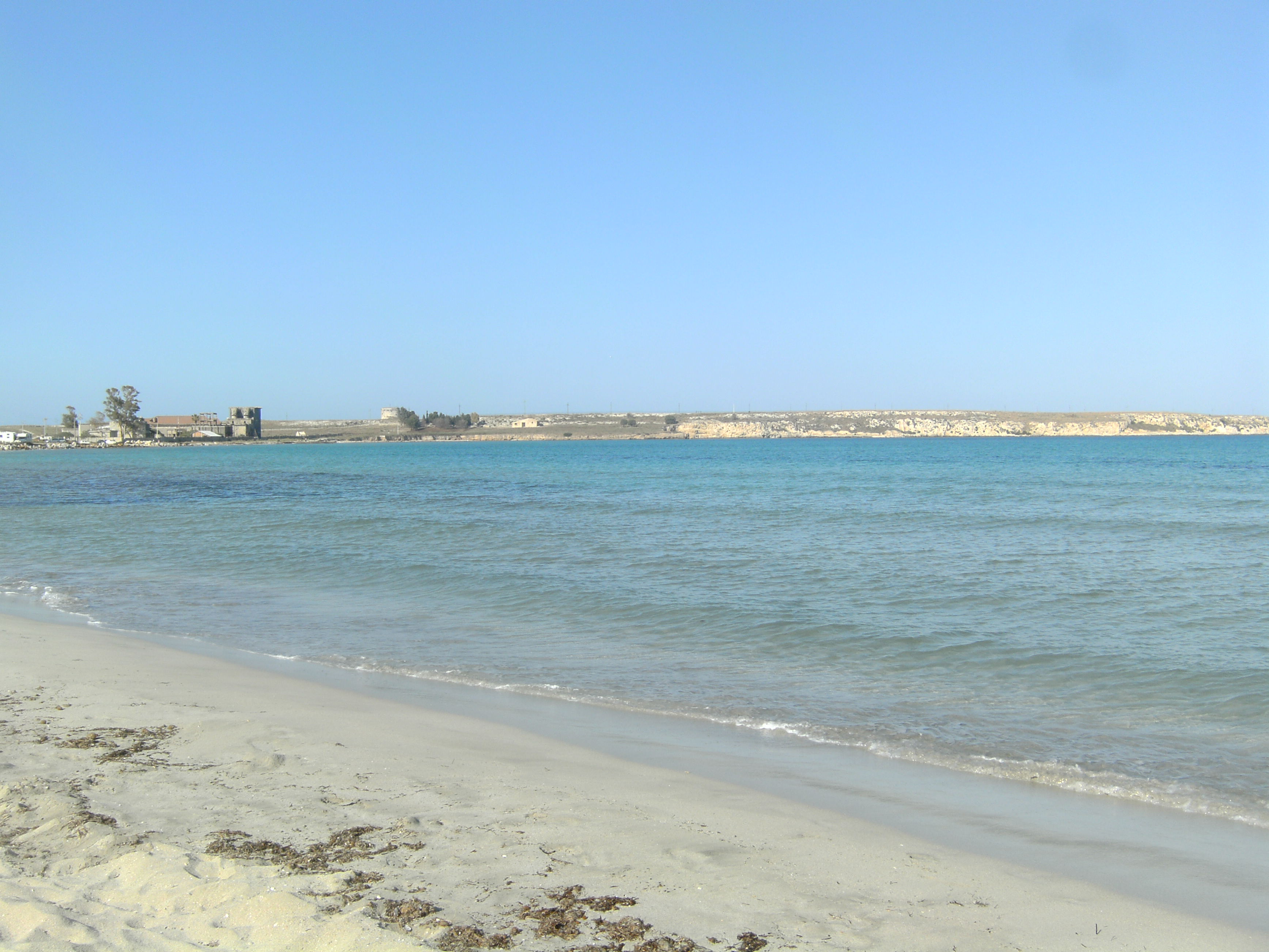 La spiaggia di Marina di Melilli (SR) sullo sfondo la Penisola di Magnisi.